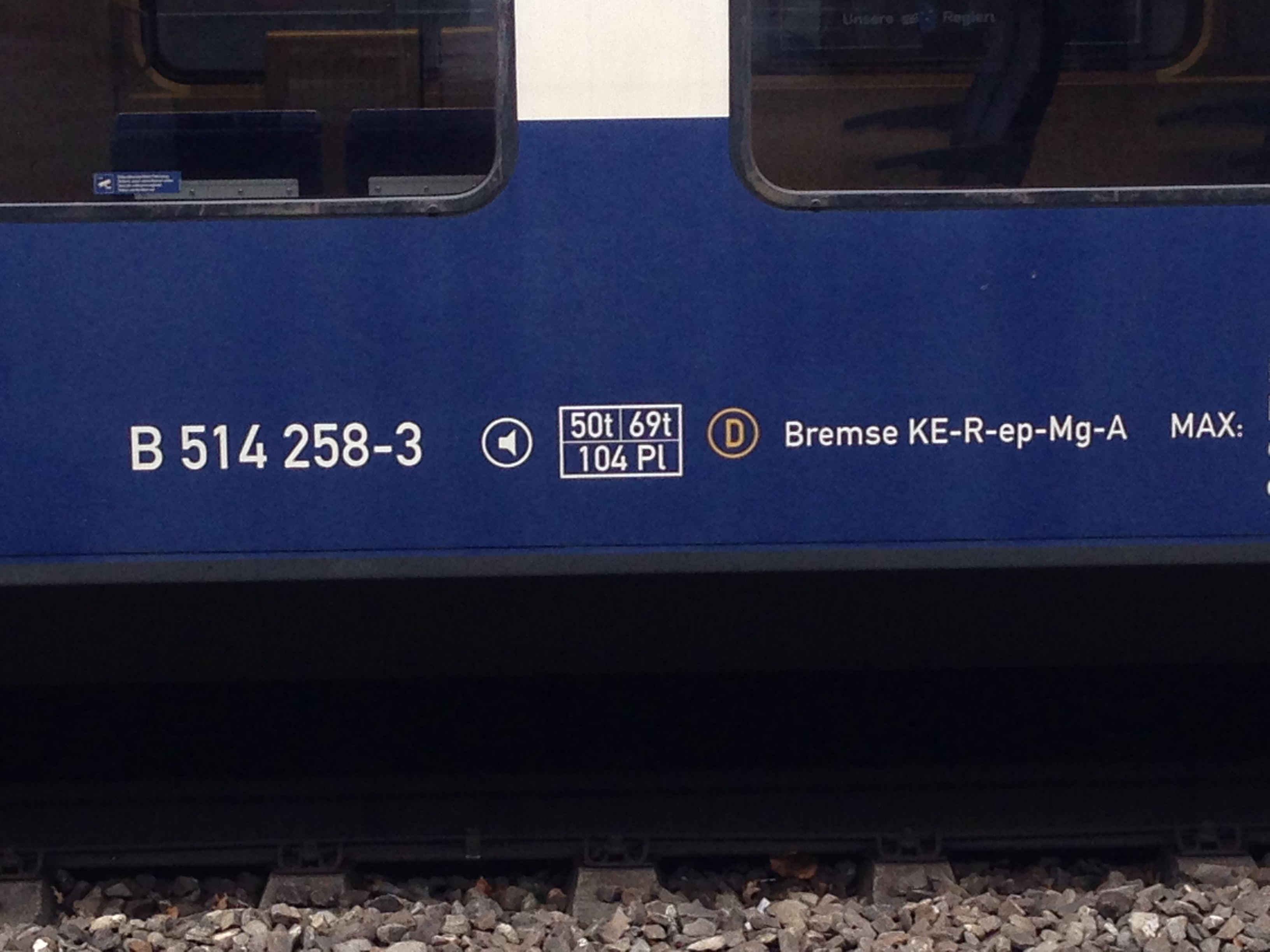 EDV-Nummer am zweiten Wagen des Doppelstocktriebzugs (DTZ) 514 058 der SBB